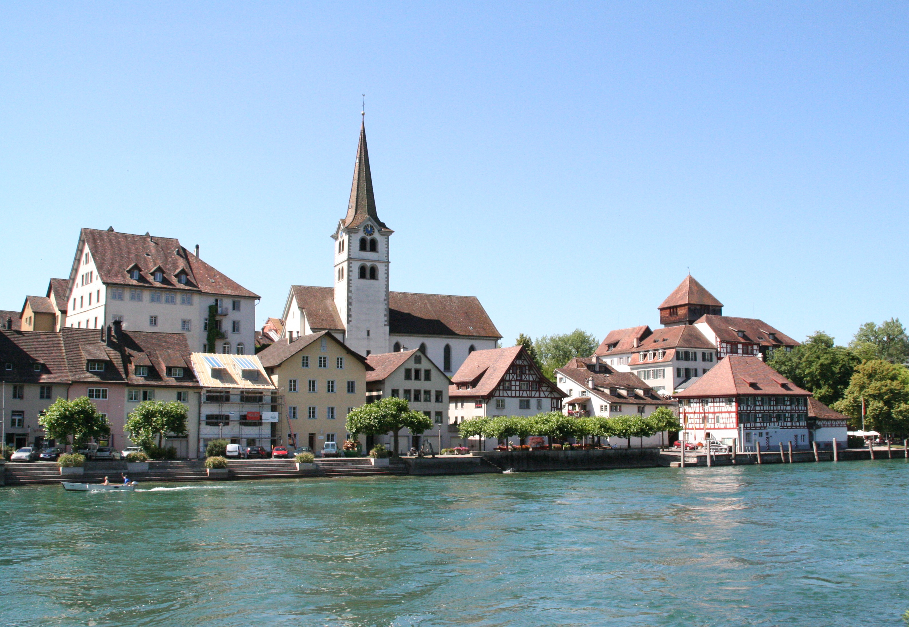 Diessenhofen